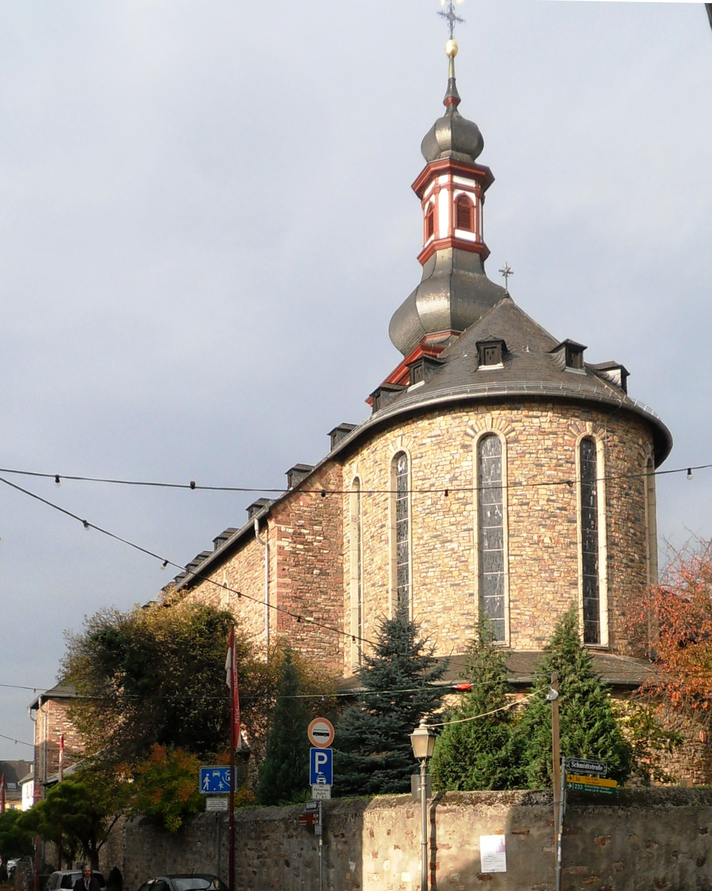 Die nach den Zerstörungen des Zweiten Weltkriegs wieder aufgebaute katholische Pfarrkirche St. Jakobus am Marktplatz in Rüdesheim am Rhein, Blick von Osten